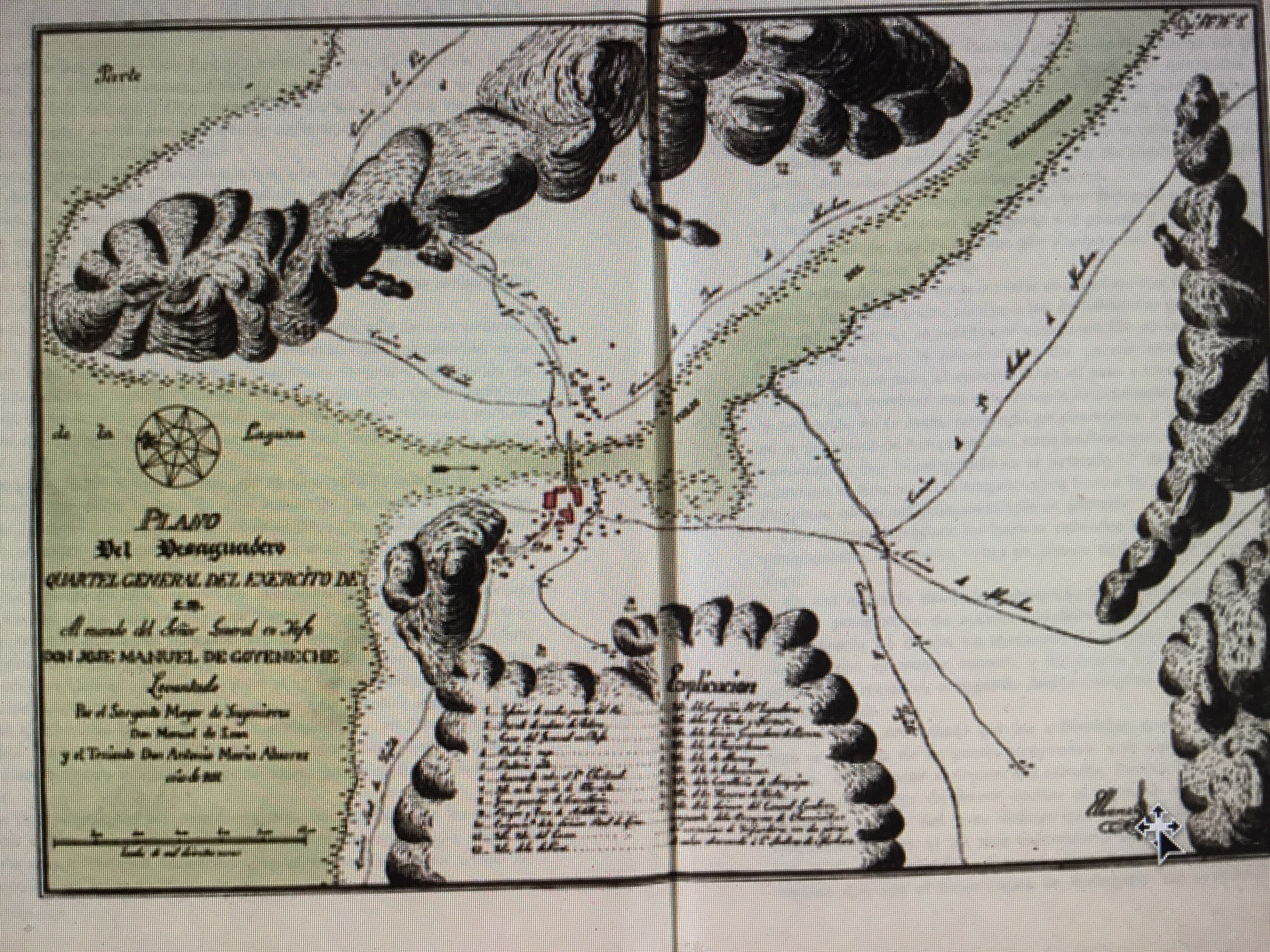 Plano levantado con fines militares por orden el comandante del Ejercito Real del Perú, José Manuel Goyeneche, en 1811.